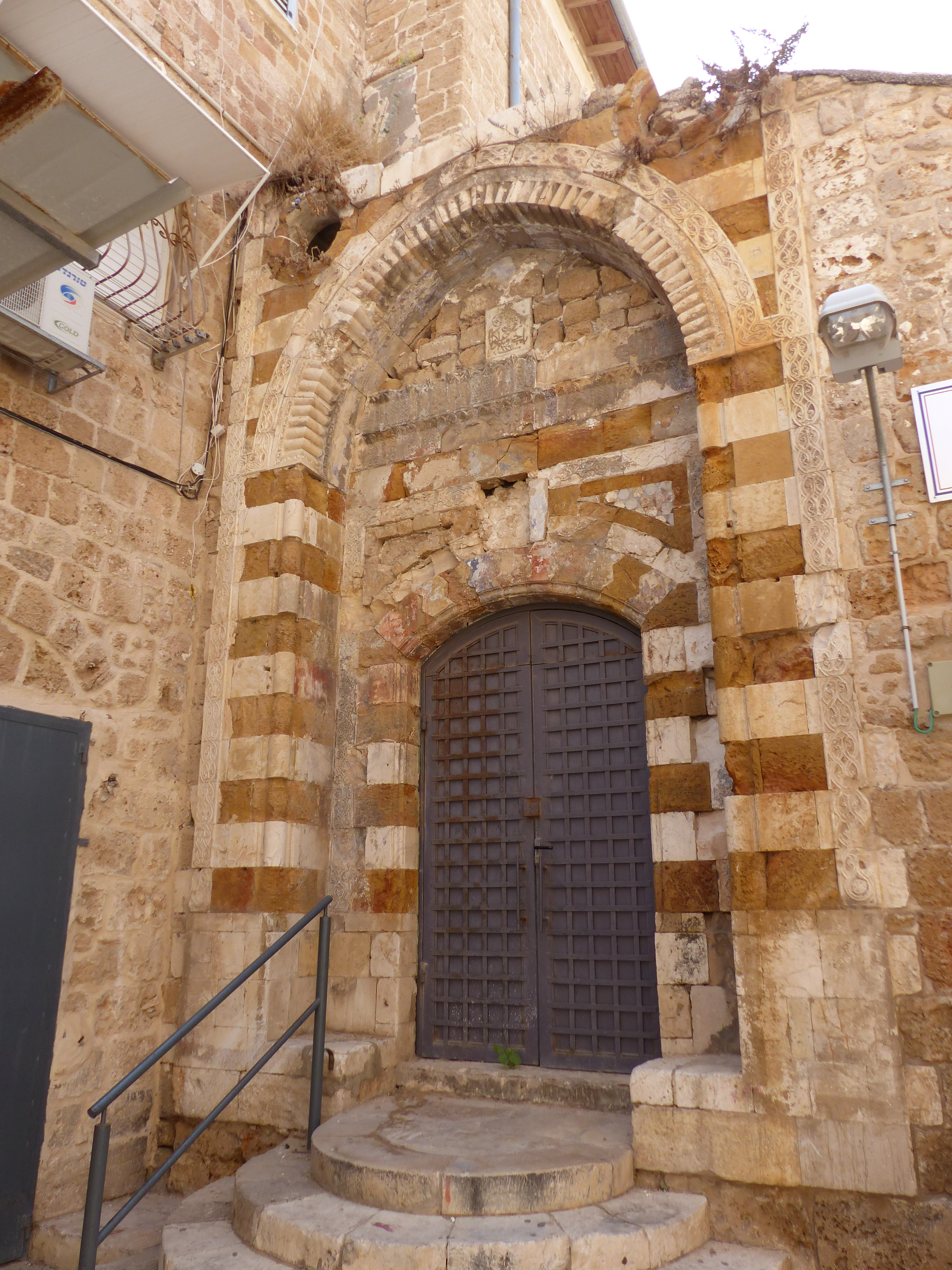 Ciudad vieja de Acre, Israel